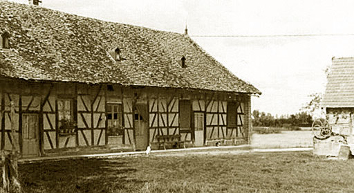 Ferme Bressane de La Picardière Habitation/ Bresse live station the "Picardière"